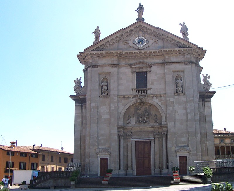 Urgnano - Chiesa Parrocchiale dei Ss. Nazario e Celso